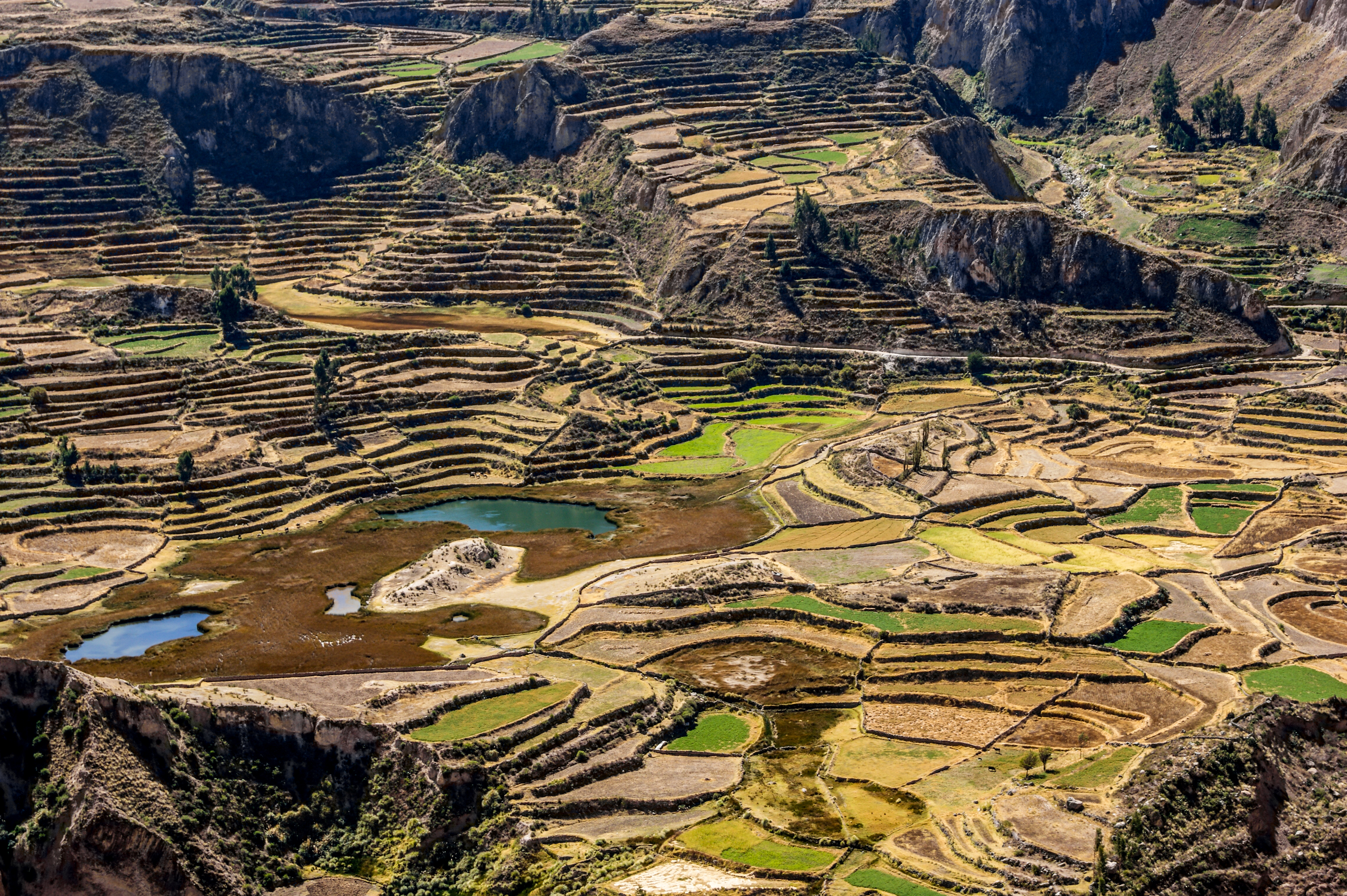 Antiguo sistema de cultivo de la cultura Inca, en la region El Colca, Arequipa, Peru.